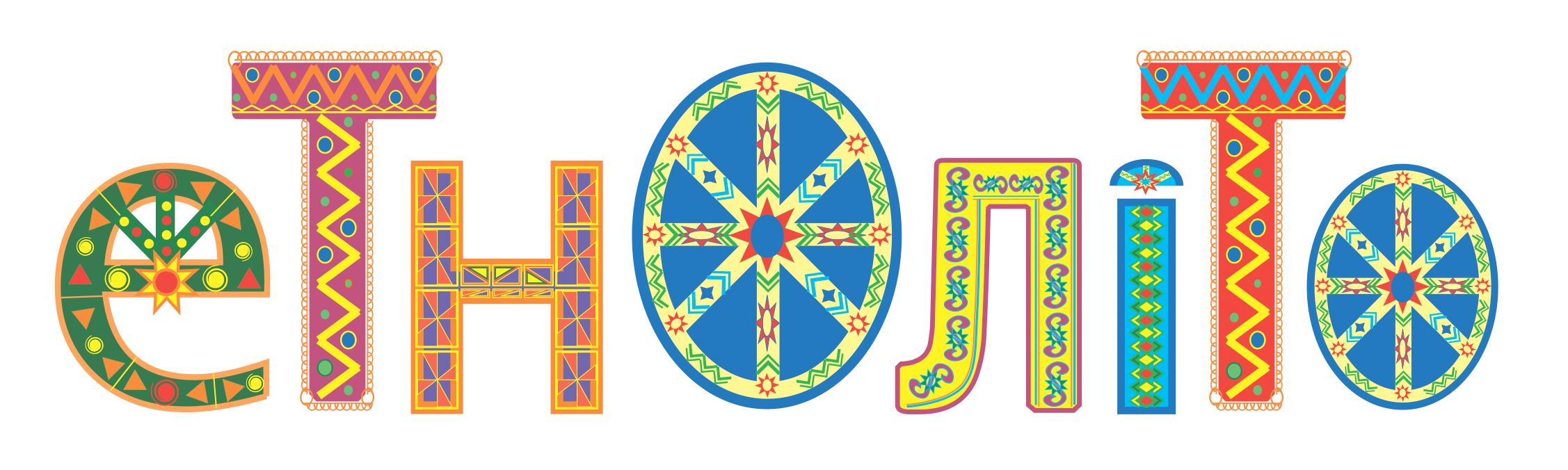 ЕтноЛіто - Логотип